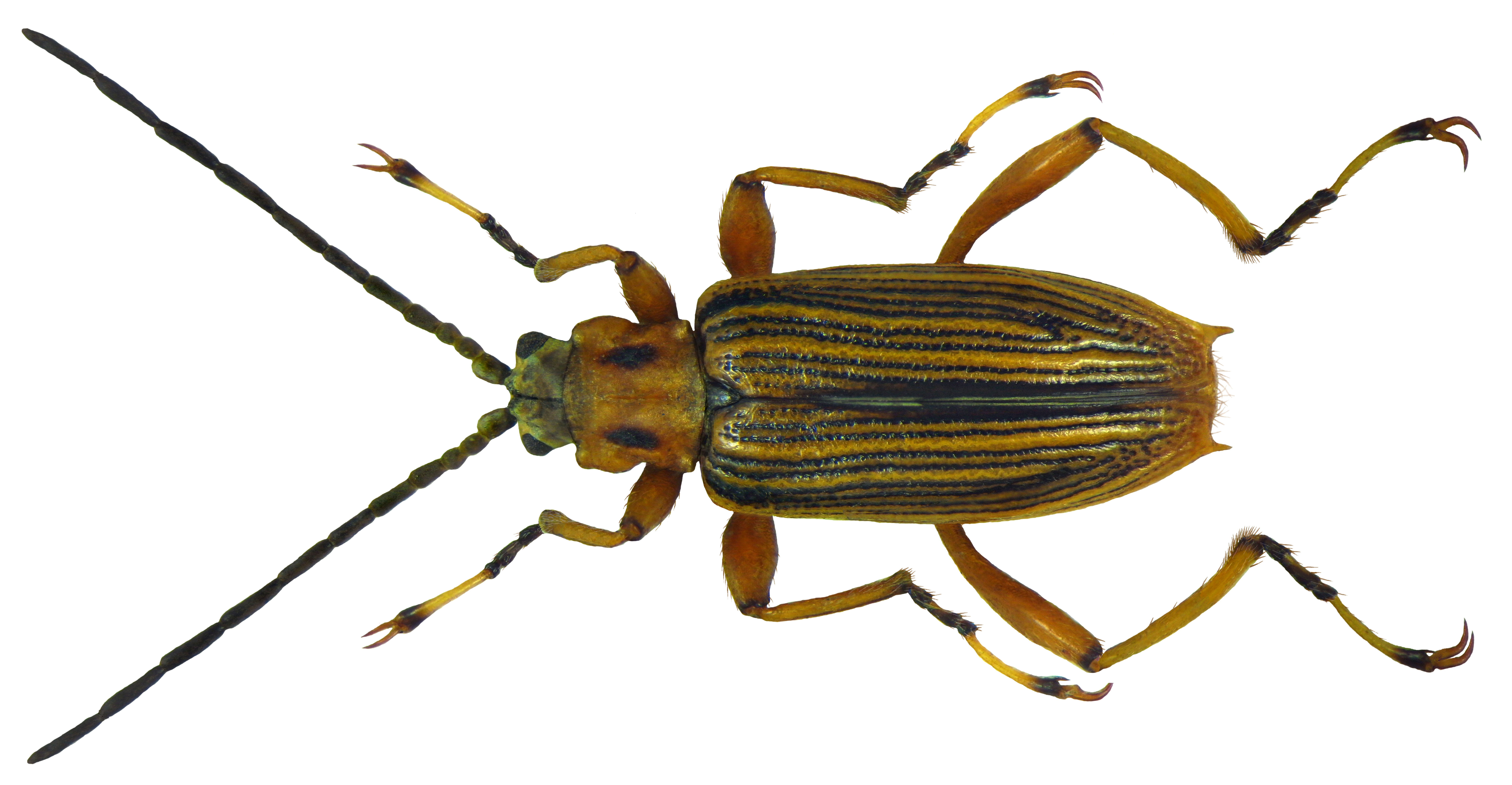 Macroplea appendiculata (Panzer, 1794) Familie: Chrysomelidae Groesse: 6,8 mm Verbreitung: Mitteleuropa, südliches Nordeuropa Oekologie: unter Wasser an Potamogeton-Arten und Myriophyllum spicatum Fundort: England P.Harwood coll Pres, 1957; Coll. Museum Oxford Photo: U.Schmidt, 2011